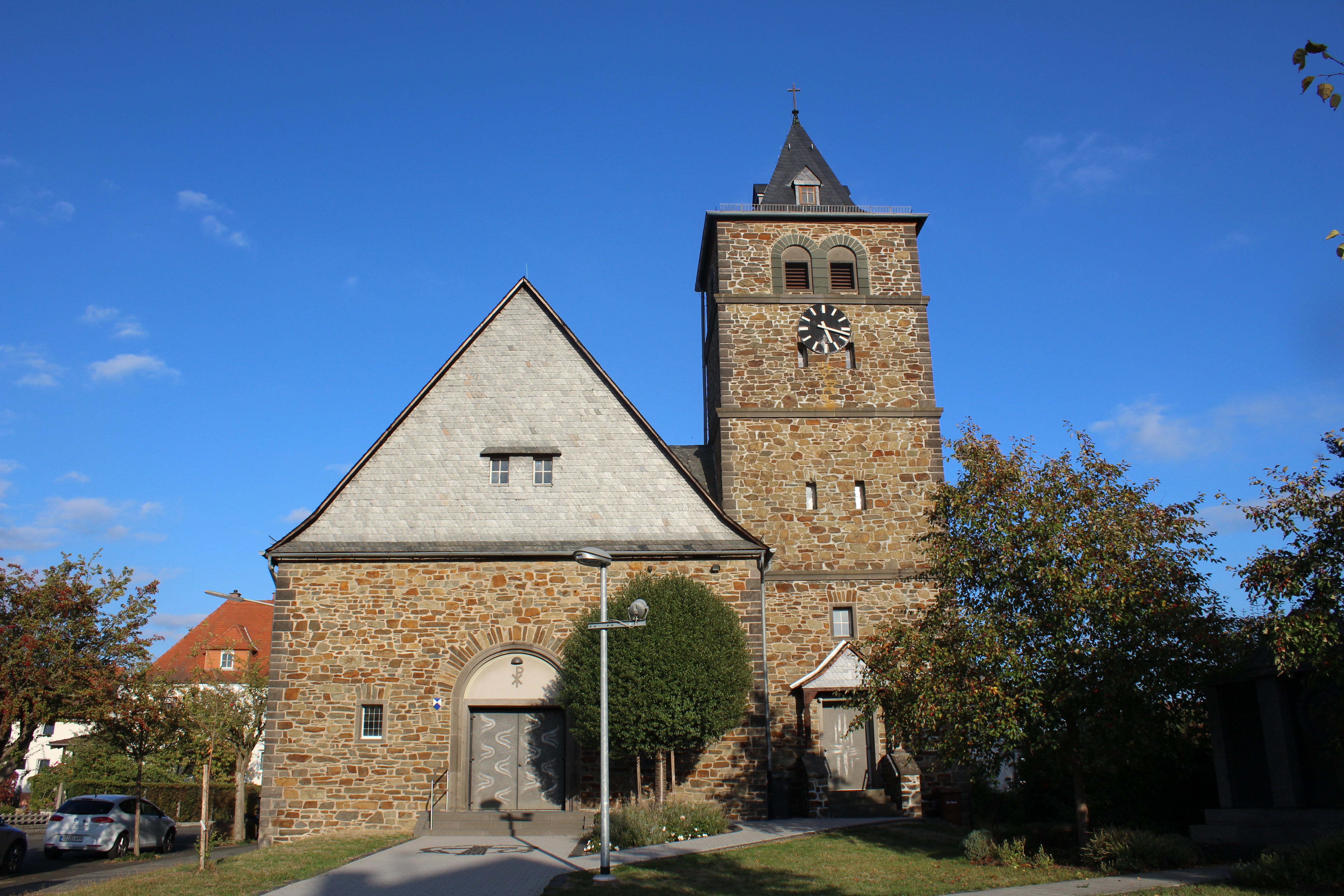 Evangelische Kirche Münchholzhausen, Wetzlar, Lahn-Dill-Kreis, Hessen, Deutschland